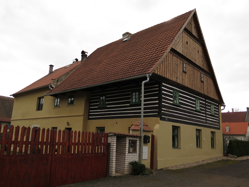 Usedlost čp. 22, Zimoř 22, Zimoř.